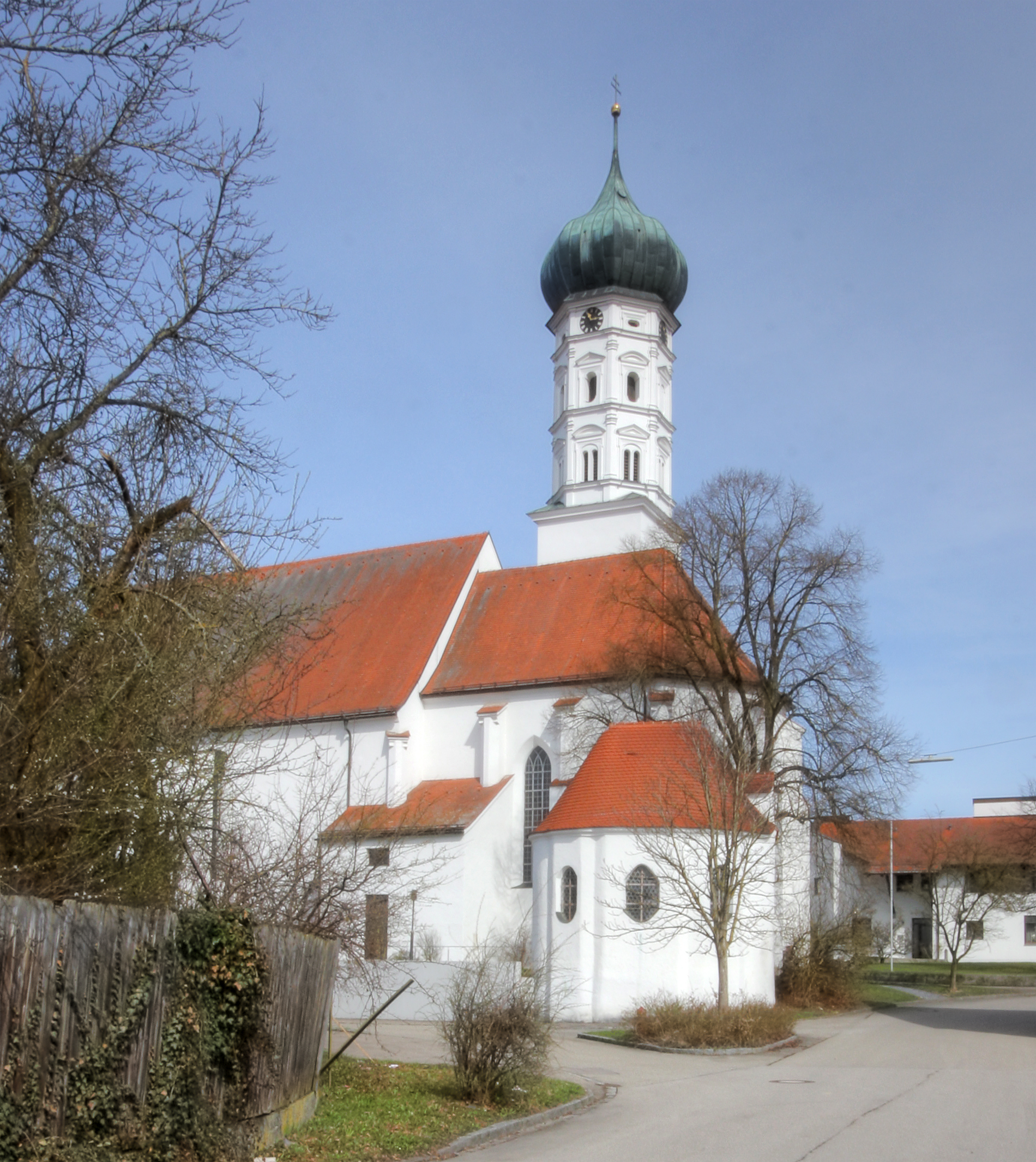 Jettingen-Scheppach, Kirche St. Martin, Architekt Erweiterungsbau: Alexander von Branca